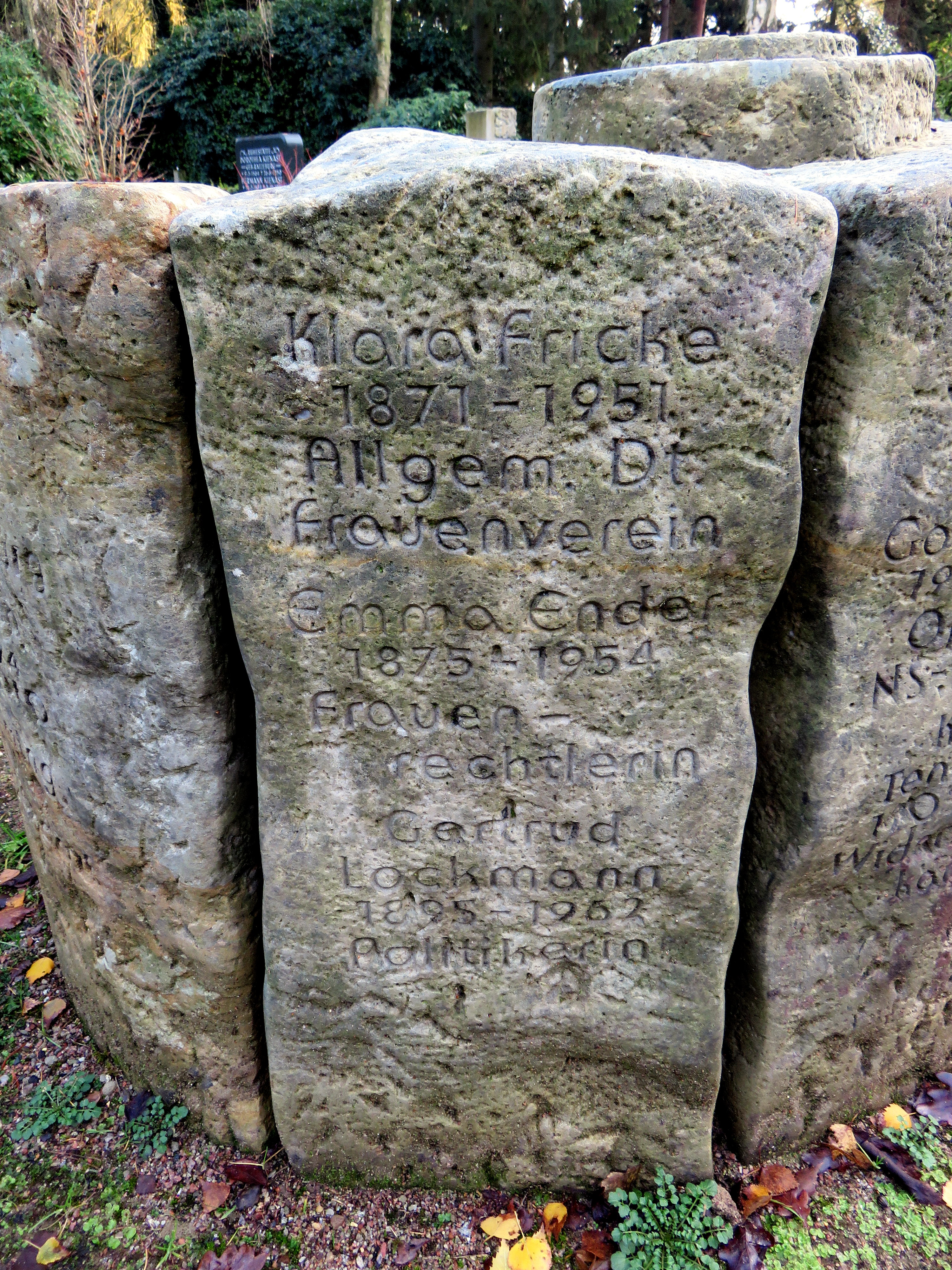 Gedenkstein für Klara Fricke, Emma Ender sowie Gertrud Lockmann in der Erinnerungsspirale im Bereich des Gartens der Frauen auf dem Ohlsdorfer Friedhof in Hamburg-Ohlsdorf.